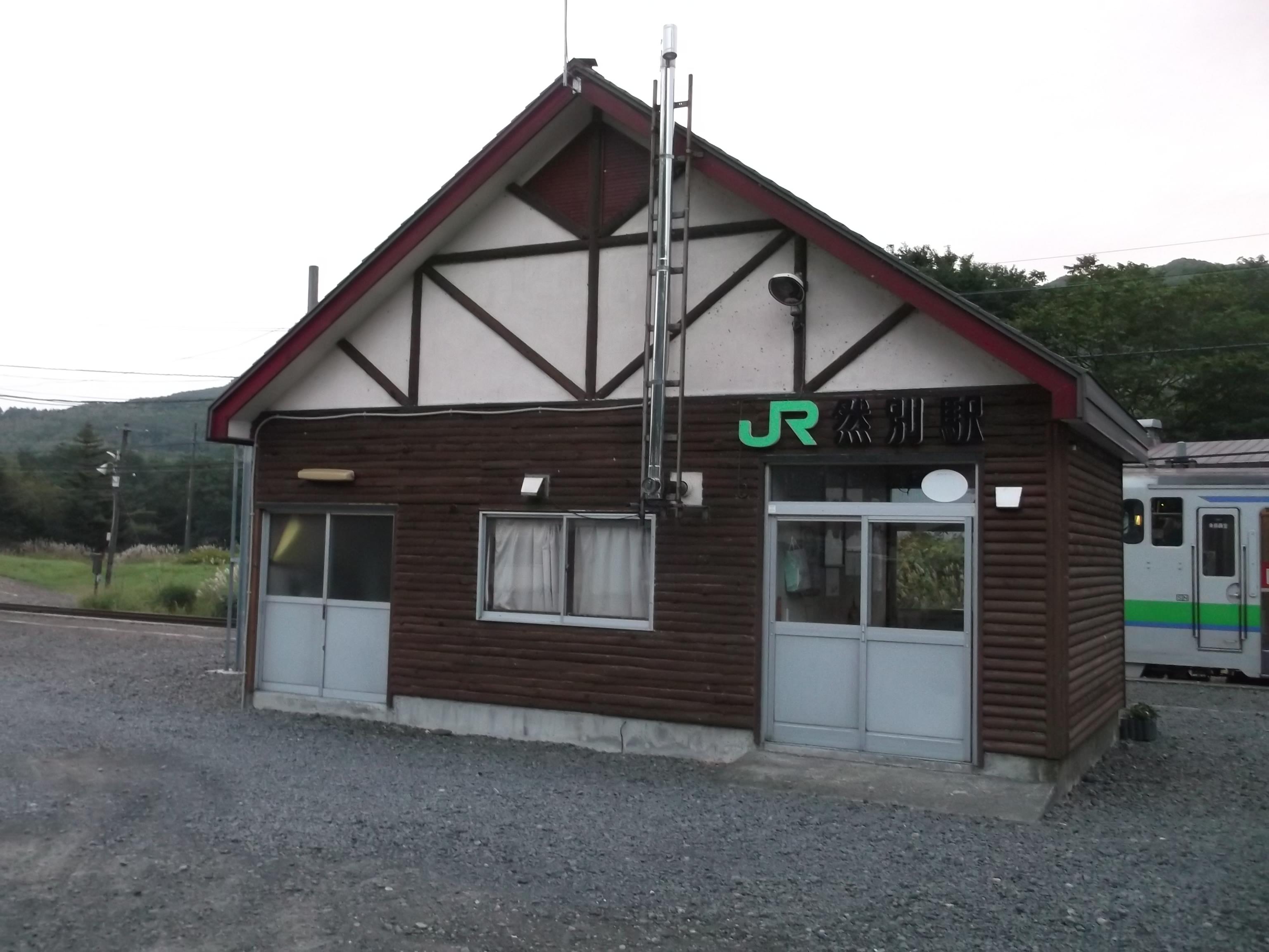 JR函館本線 然別駅駅舎